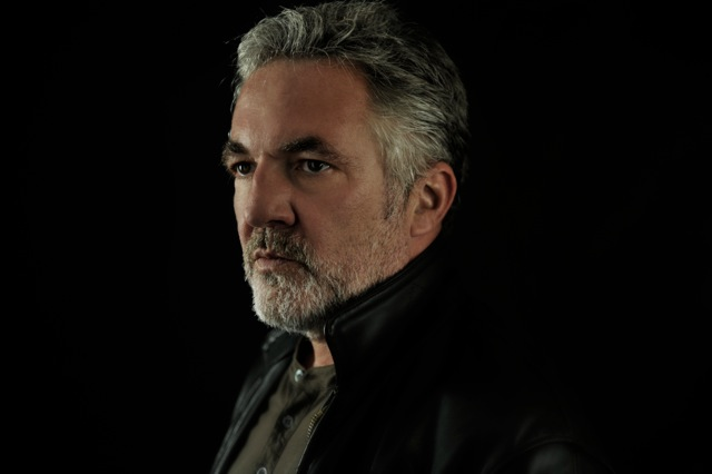 Der deutsche Journalist und Schriftsteller Thomas Palzer